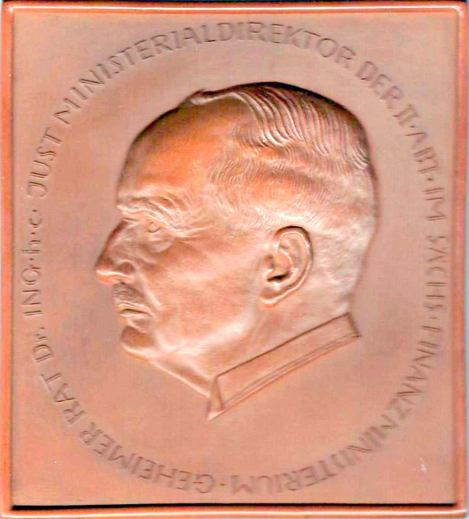 Die Plakette der Porzellanmanufaktur Meißen für Ernst Wilhelm Just (1865–1945) ist wahrscheinlich 1921 im Rahmen der Verleihung des Ehrendoktors oder zur Pensionierung 1929 (J. war Aufsichtsrat der Manufaktur) entstanden.